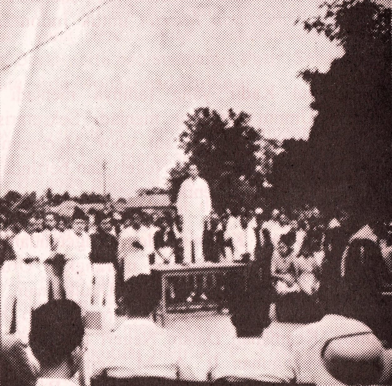 Moeis Hassan (berdiri di tengah) saat peletakan batu pertama Tugu 40 Tahun Kebangunan Nasional pada 20 Mei 1948.